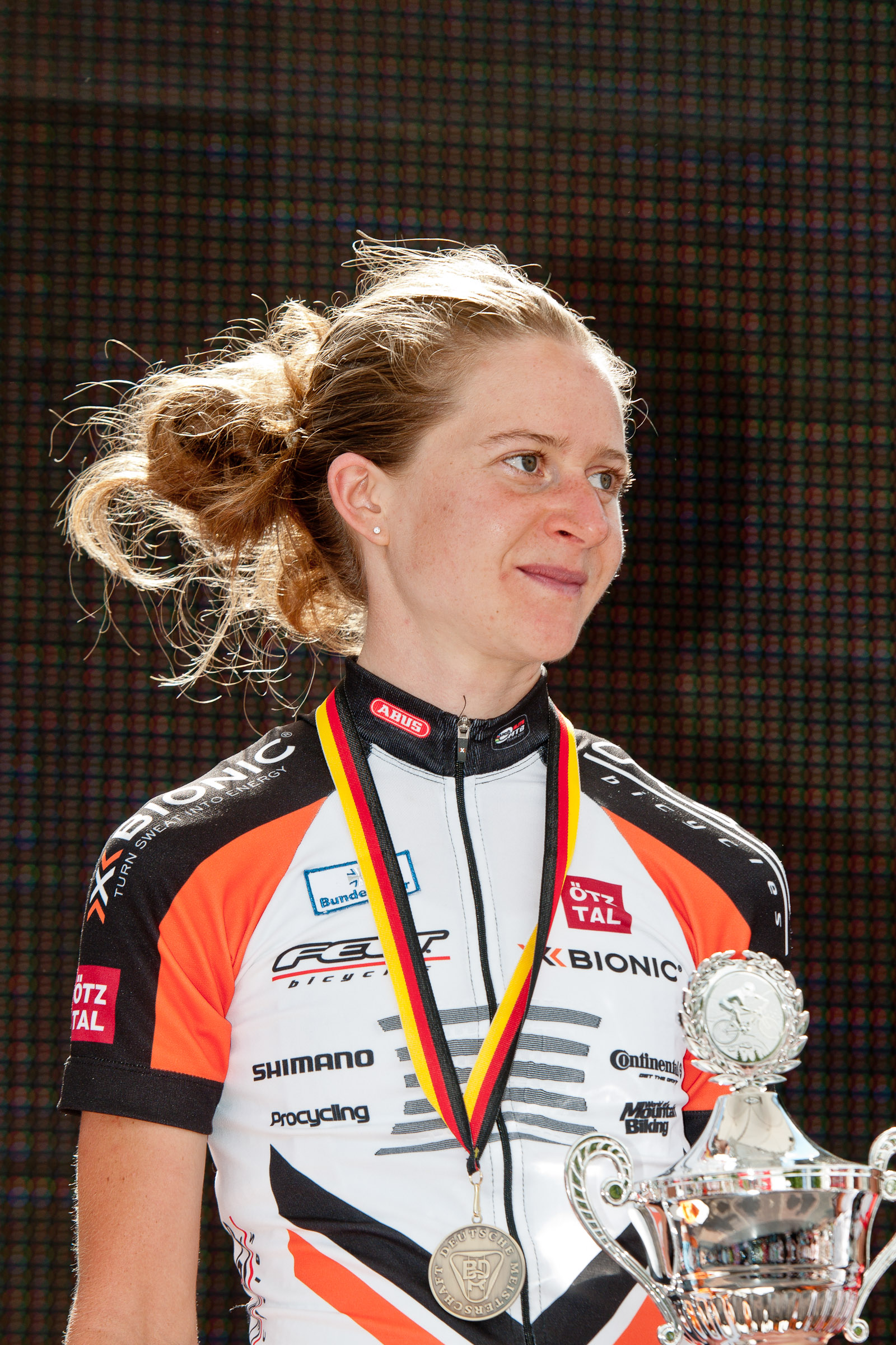 Adelheid Morath gewinnt bei der Deustchen Meisterschaft 2011 die Bronzemedialle